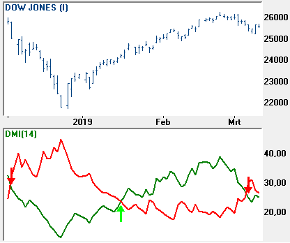 Directional Movement Indicator toegepast op de Dow Jones Index